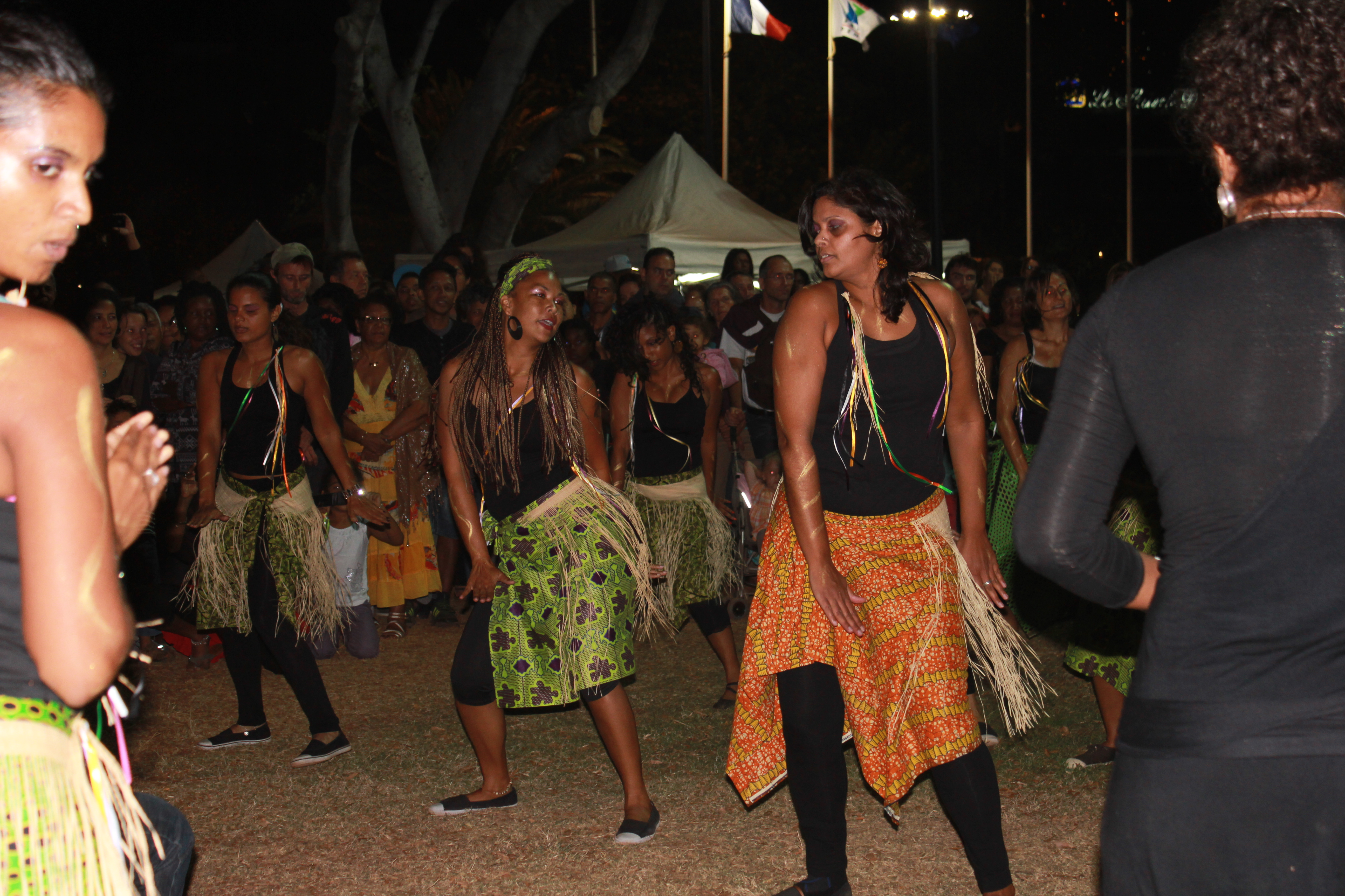 Représentation de danse africaine au Barachois